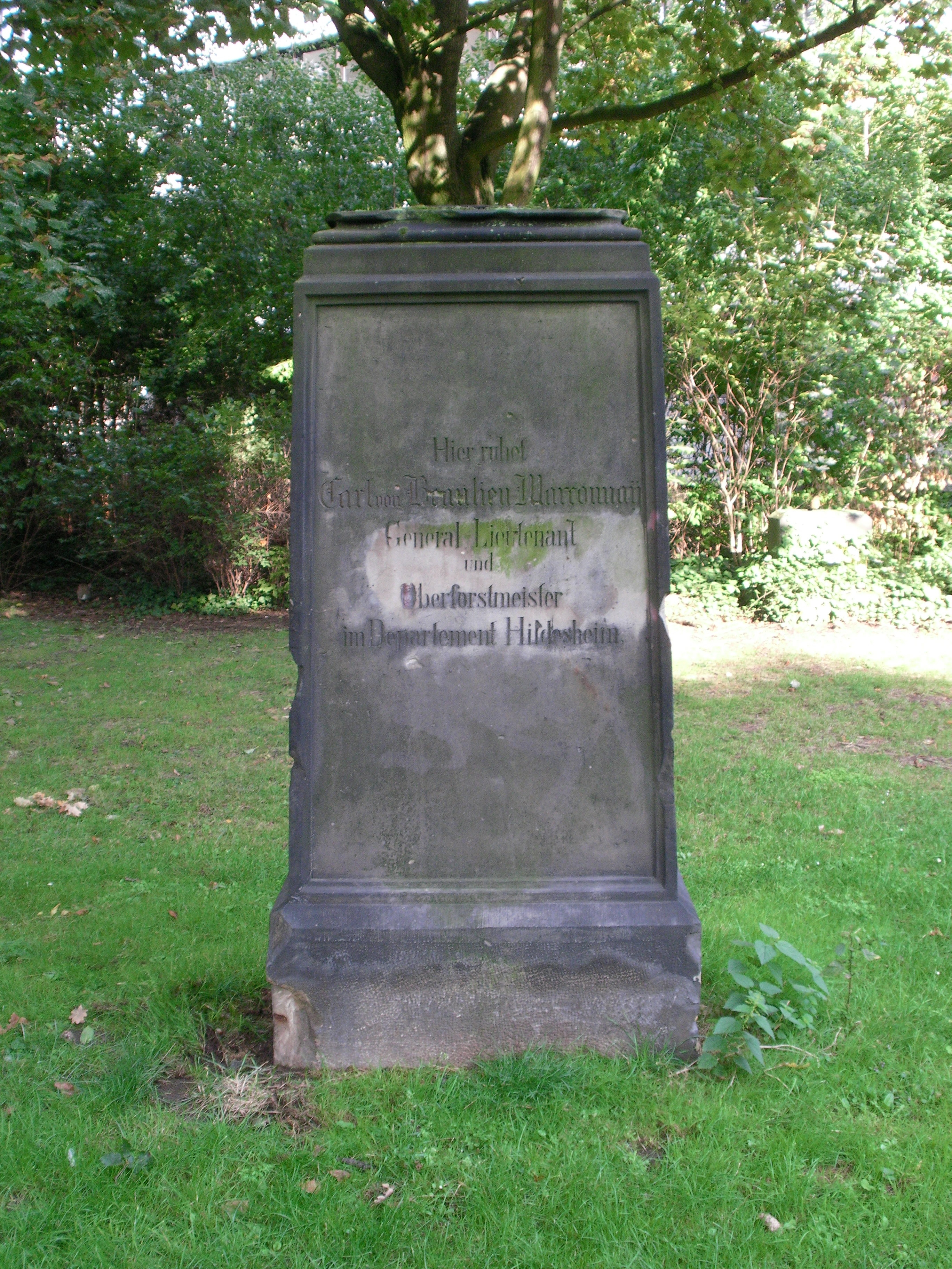 Grabstein des Generalleutnants und Oberforstmeisters Carl von Beaulieu-Marconnay auf dem Marienfriedhof in Hildesheim